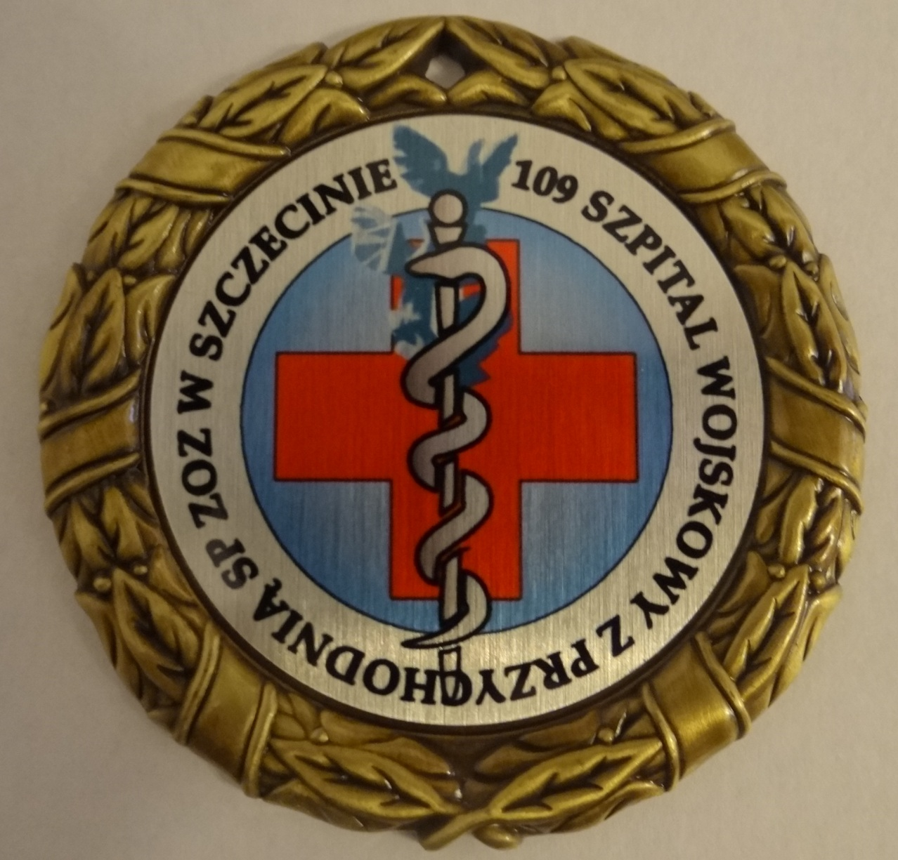 Medal Pamiątkowy z okazji 70-lecia 109 Szpitala Wojskowego